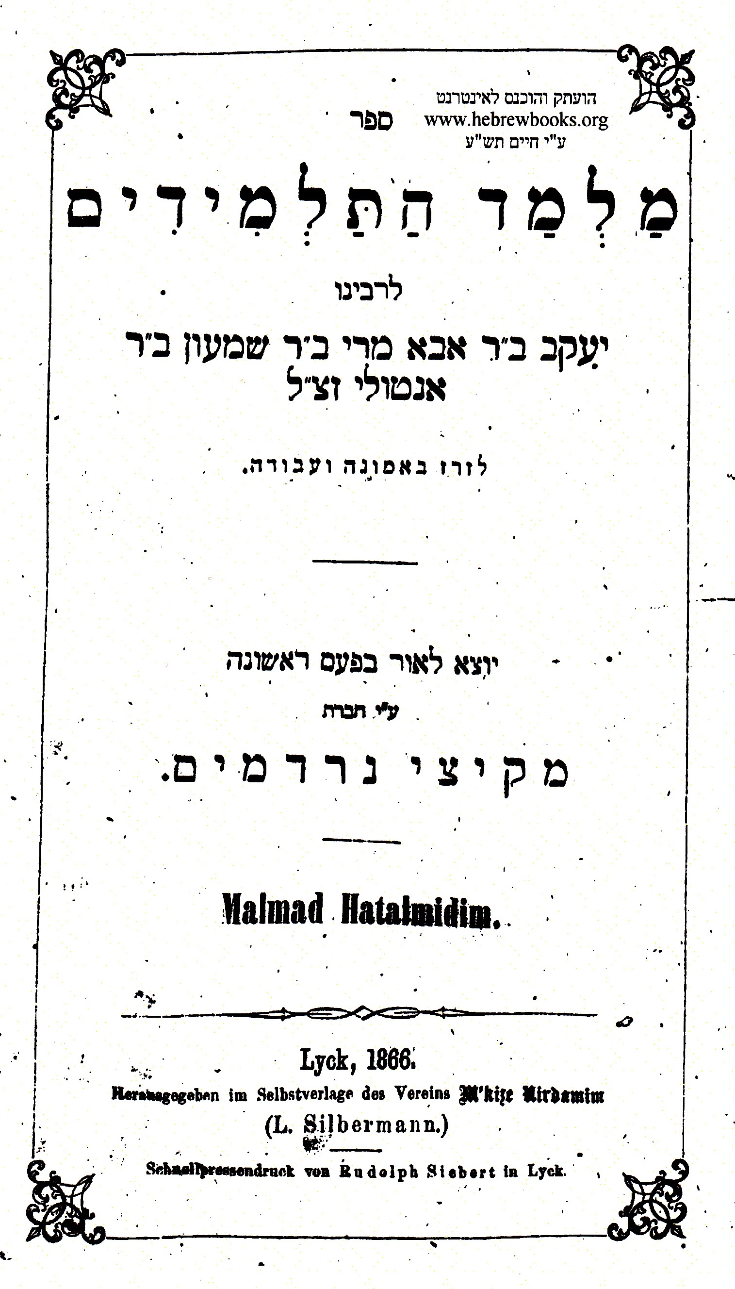 יעקב בן אבא מרי אנטולי "Malmad Hatalmidim" Book Cover